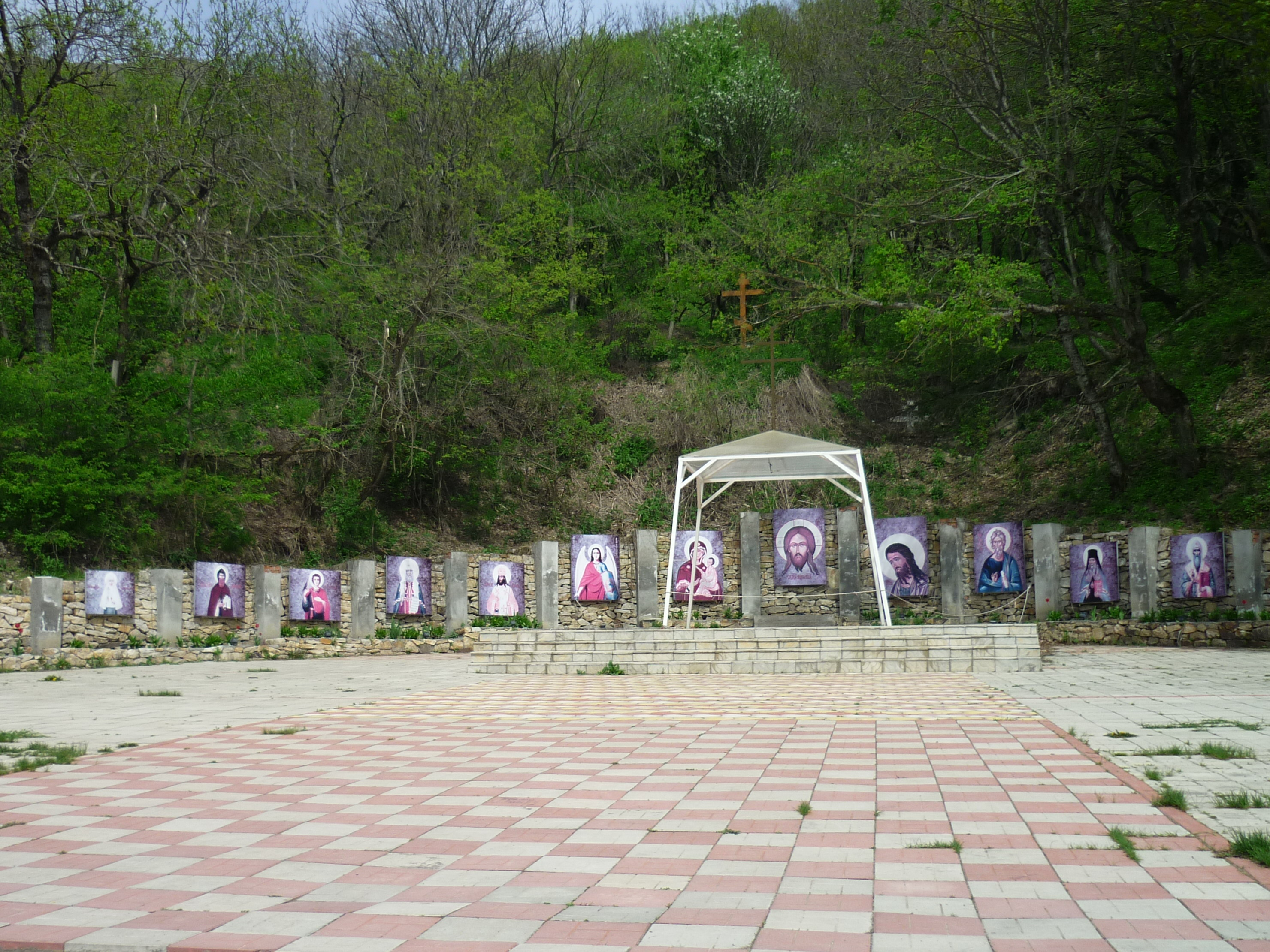 На территория Второафонского Успенского мужского монастыря